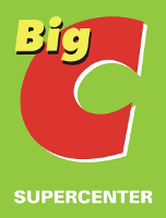 Biểu tượng Big C